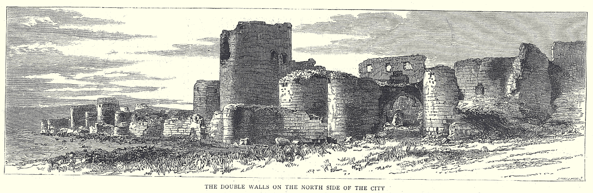 1885 engraving of Ani, Armenia